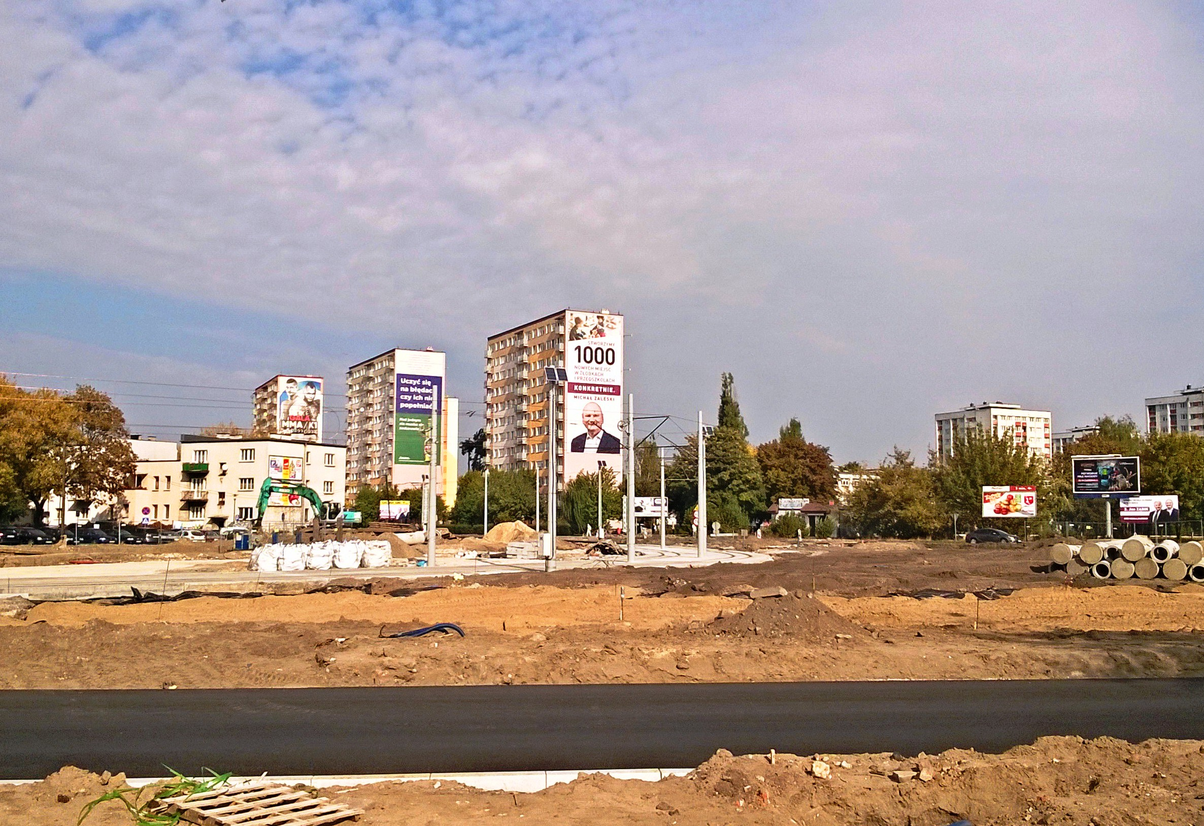 Plac bp. Jana Chrapka w Toruniu3